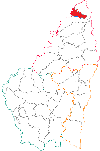 Situation du canton dans le département de l'Ardèche (France)